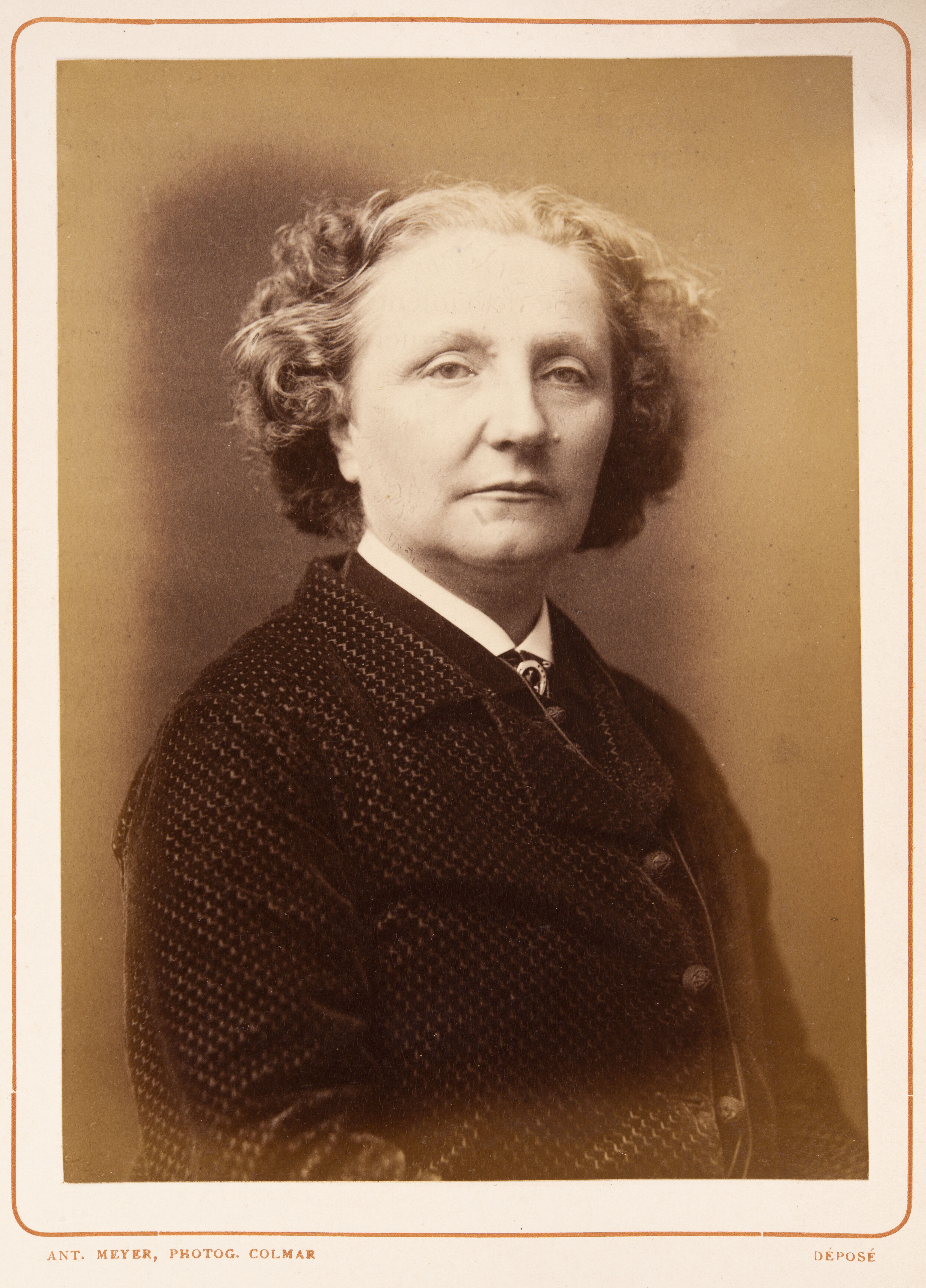 Biographies alsaciennes avec portraits en photographie : Antoinette Lix. Colmar, 1883. Bibliothèque nationale et universitaire de Strasbourg